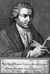 Portrait des Typografen Giambattista Bodoni (1740–1813)